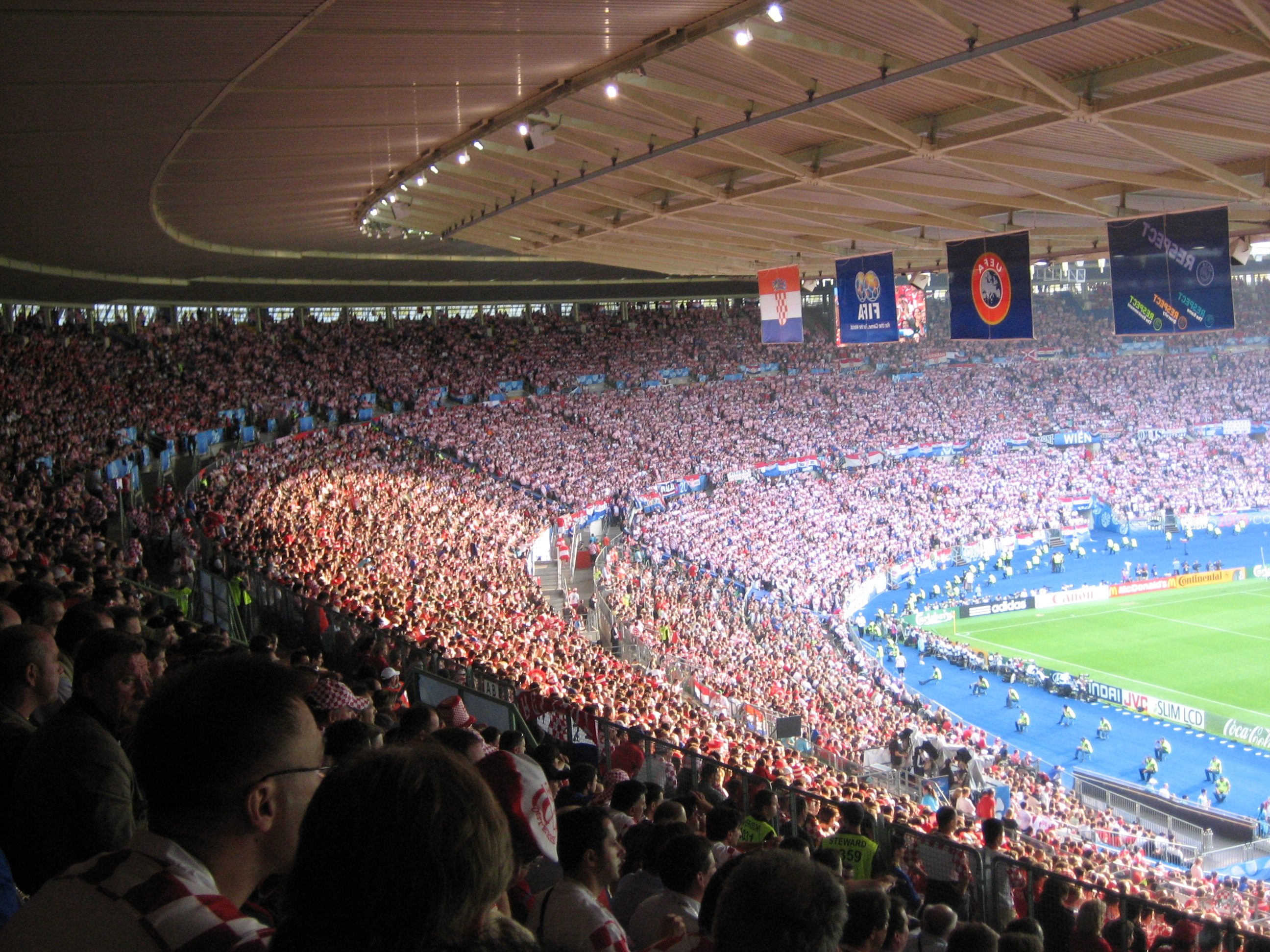 Das randvolle Ernst-Happel Stadion beim ersten Auftritt der österreichischen Nationalmannschaft bei einer EM-Endrunde